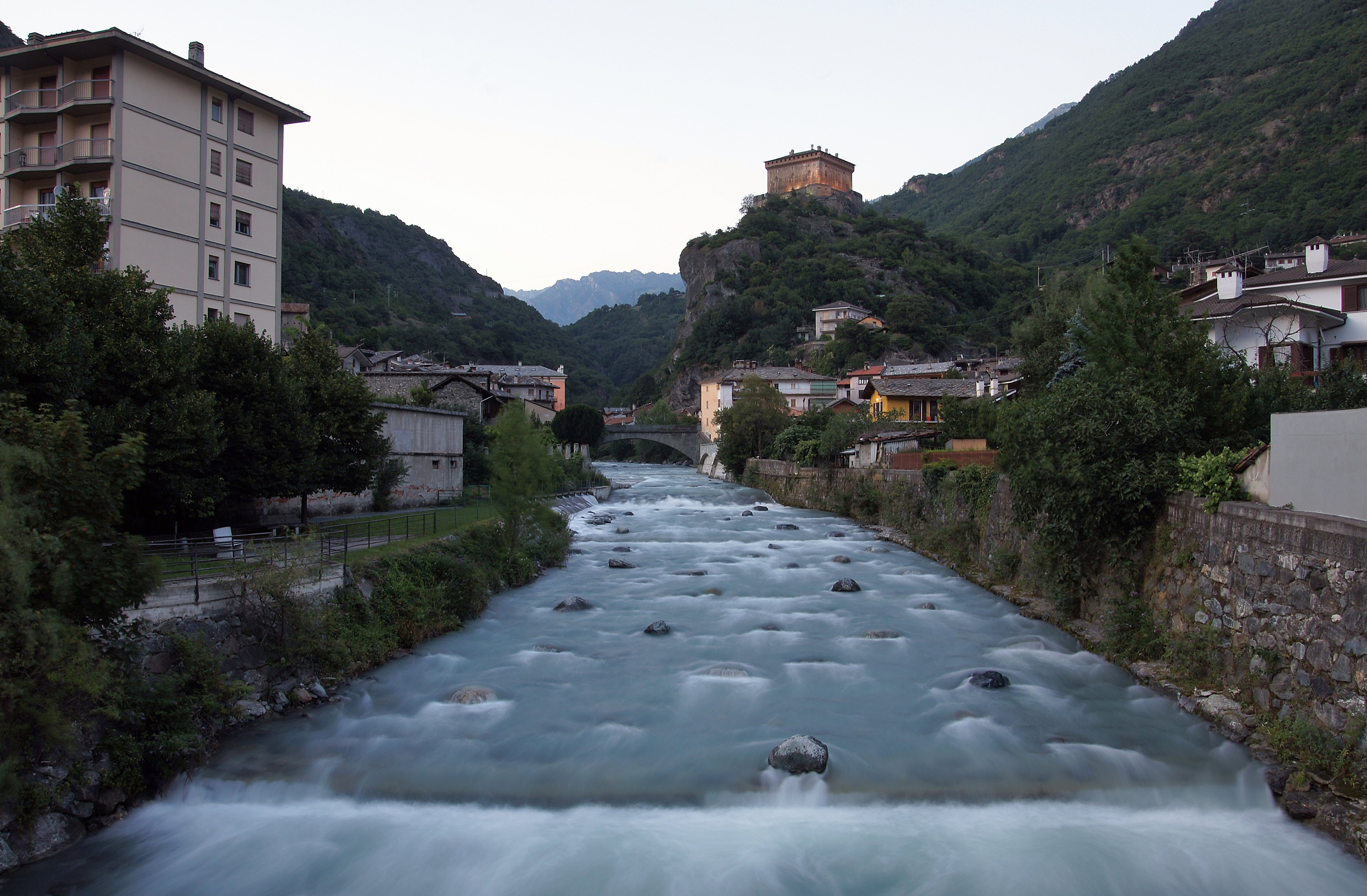 Castello di Verrès e torrente Evançon visti dal ponte in via Barrel. Verrès, Italia This is a photo of a monument which is part of cultural heritage of Italy.